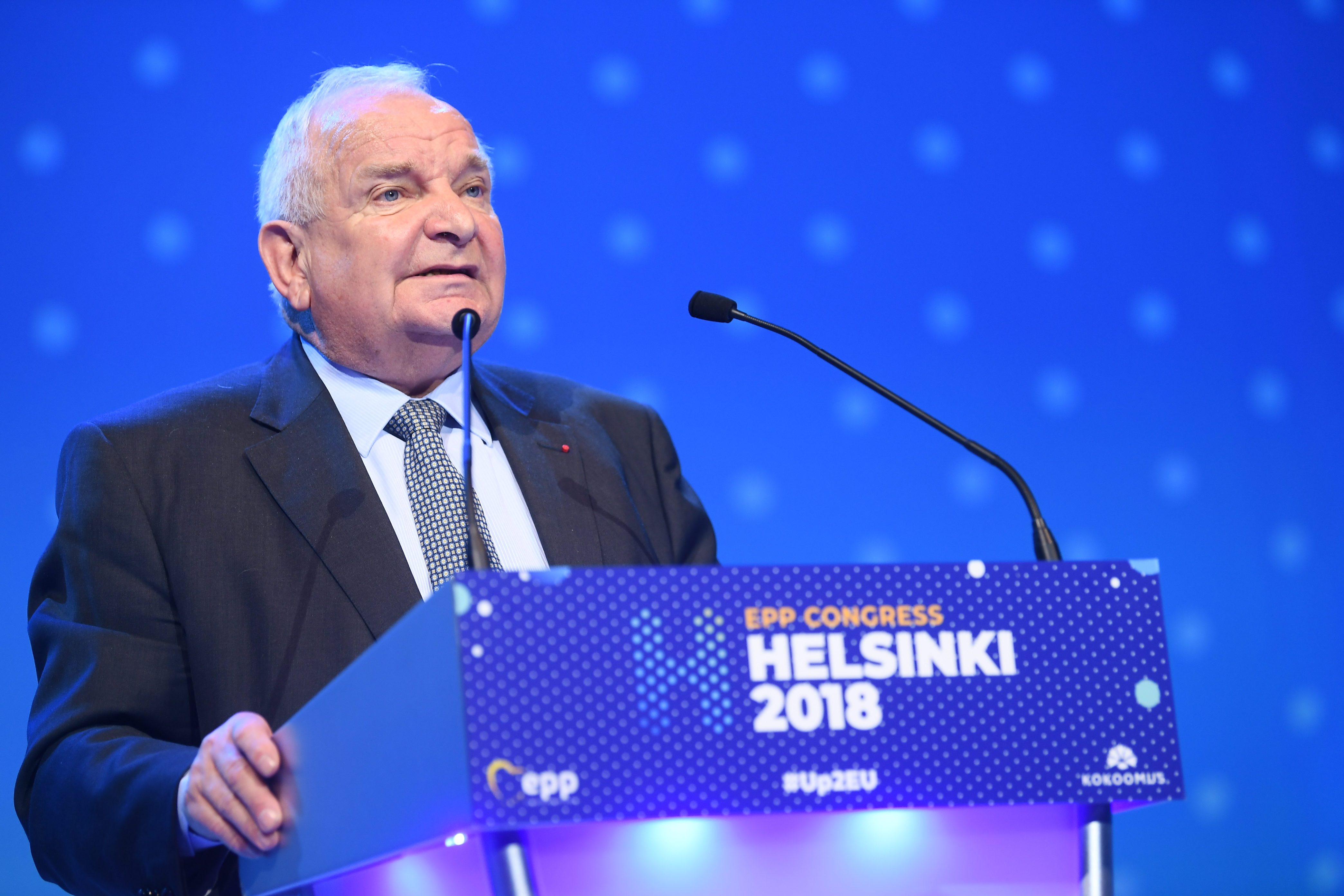 7 November 2018